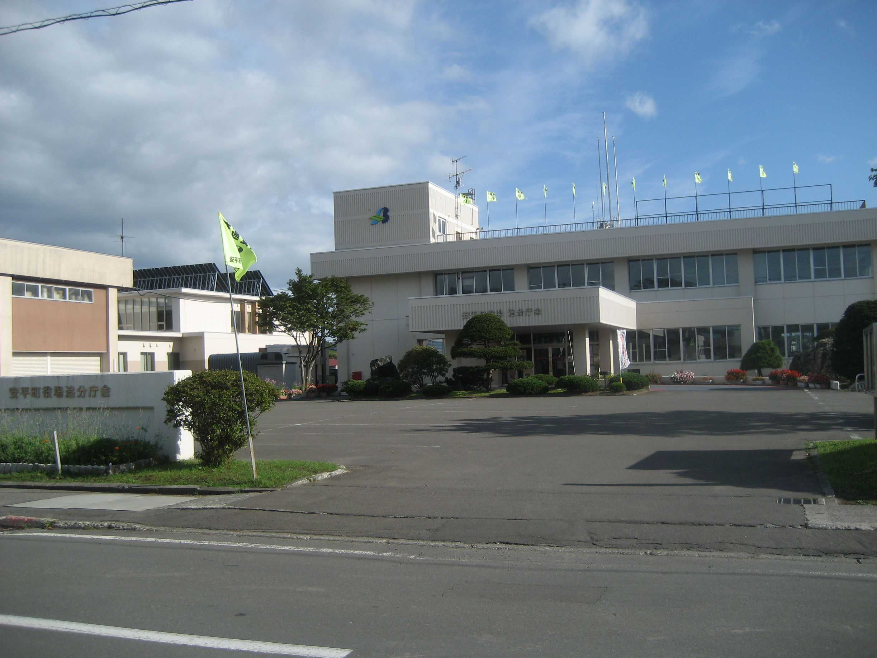 北海道にある安平町役場追分庁舎